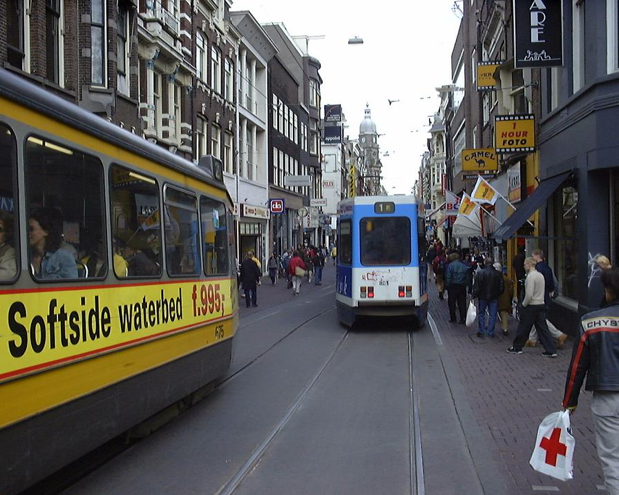 Leidsestraat Amsterdam Nederländerna Bild tagen: 1999-05-22